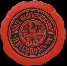 Siegelmarke der Württembergischen Handwerkskammer